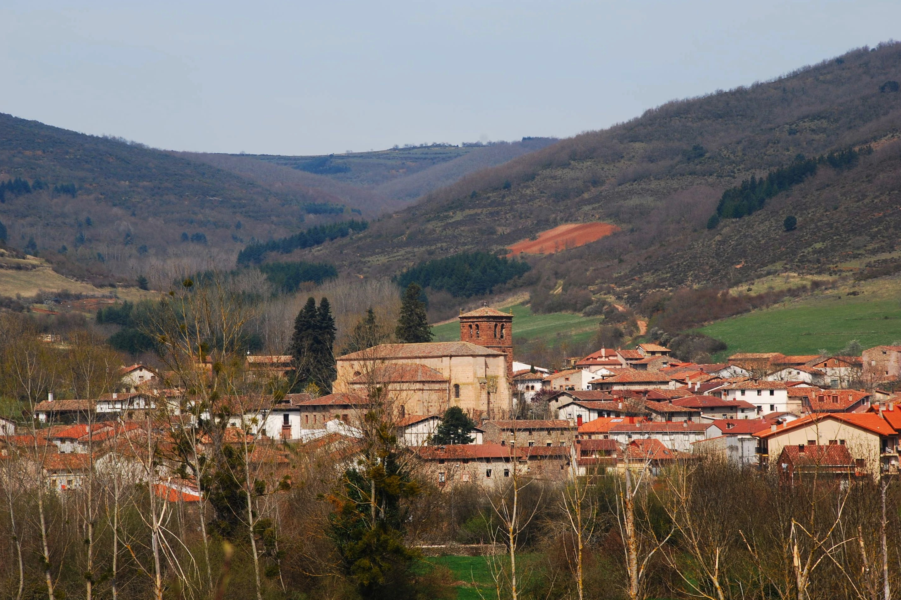 Vista de Ojacastro